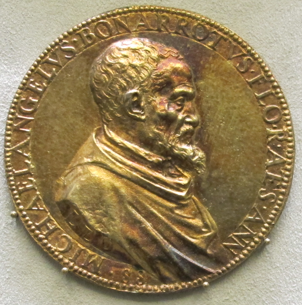 Leone leoni, medaglia di michelangelo, 1561